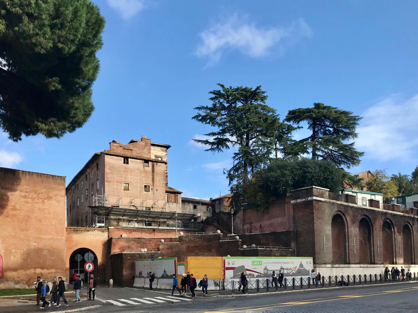 Palazzo Silvestri-Rivaldi in Rome